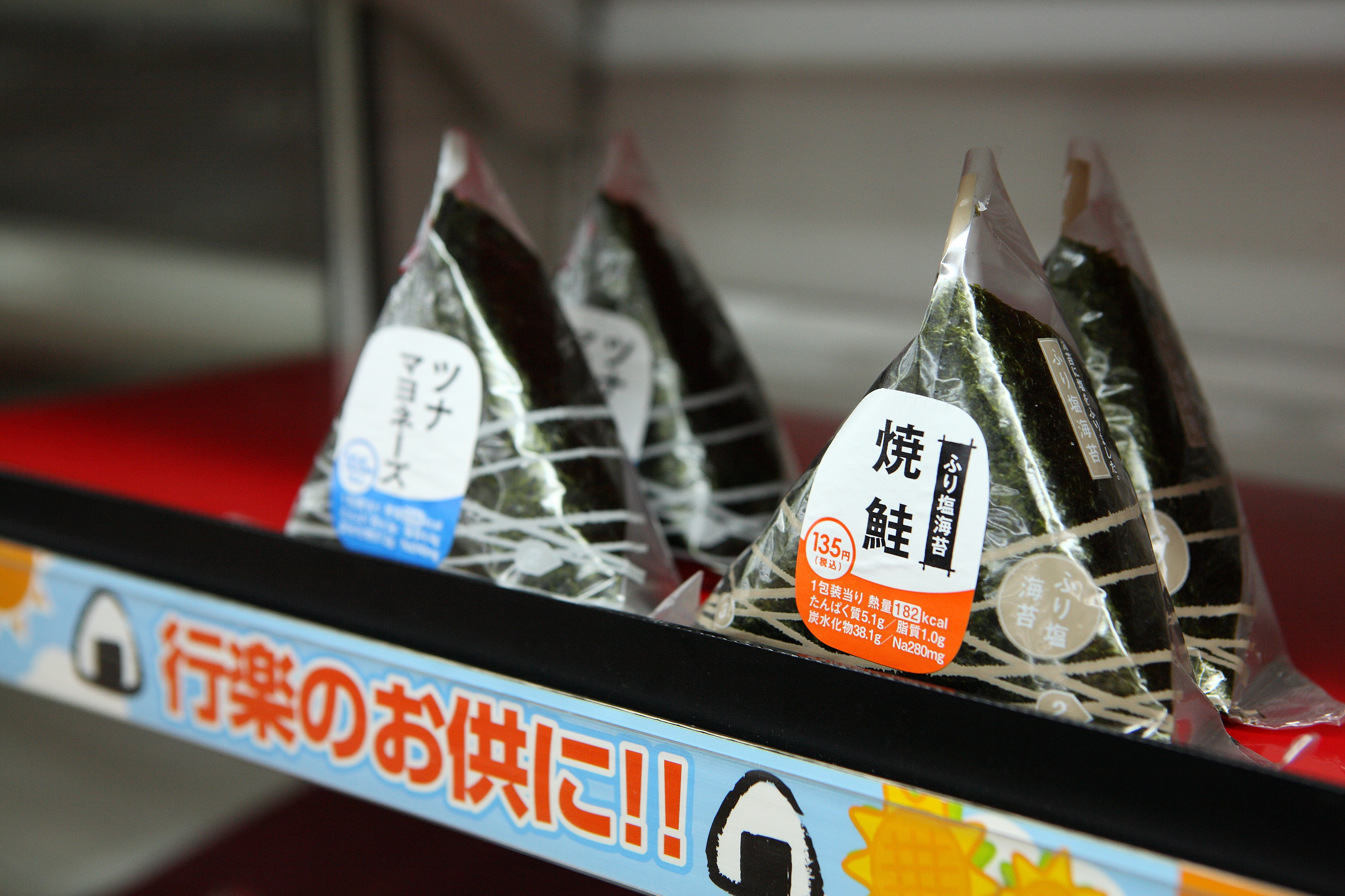 kyoto